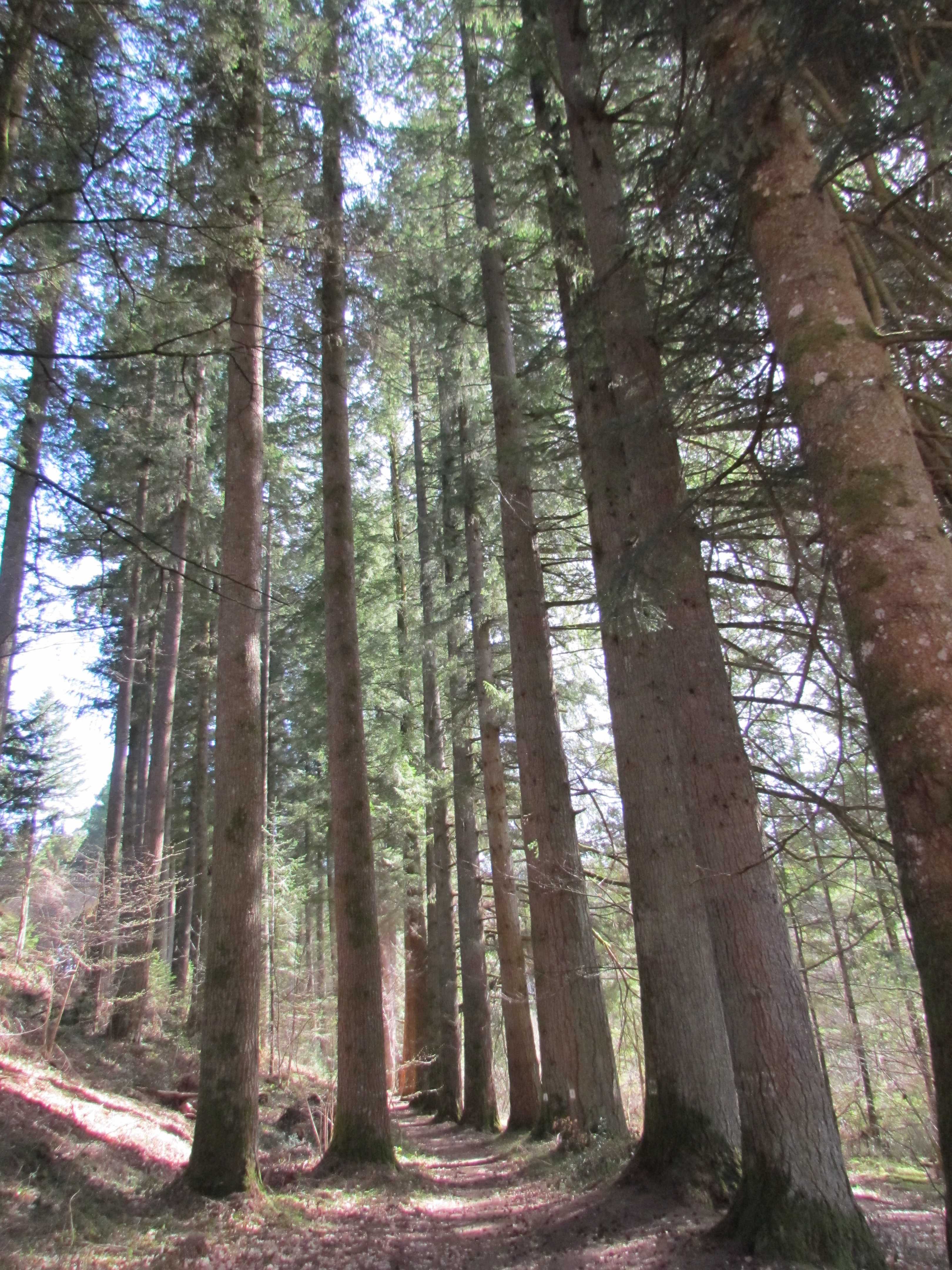 Peuplement de Douglas (Pseudotsuga menziesii) historique (créé vers 1850) de la Forêt domaniale des Farges à Meymac (Corrèze) Hauteur totale dépassant 54 m